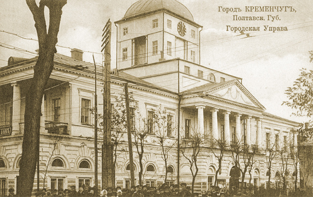 Postcards of old Kremenchuk. Міська управа.